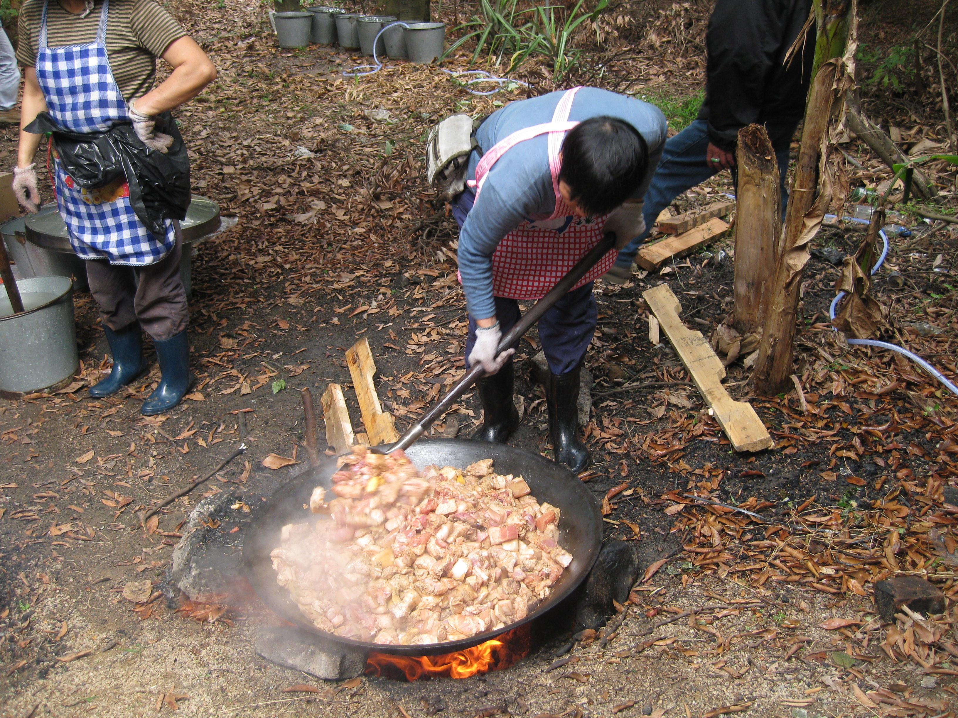 中文（香港）: 屏山鄧氏「食山頭」盆菜之烹煮情形